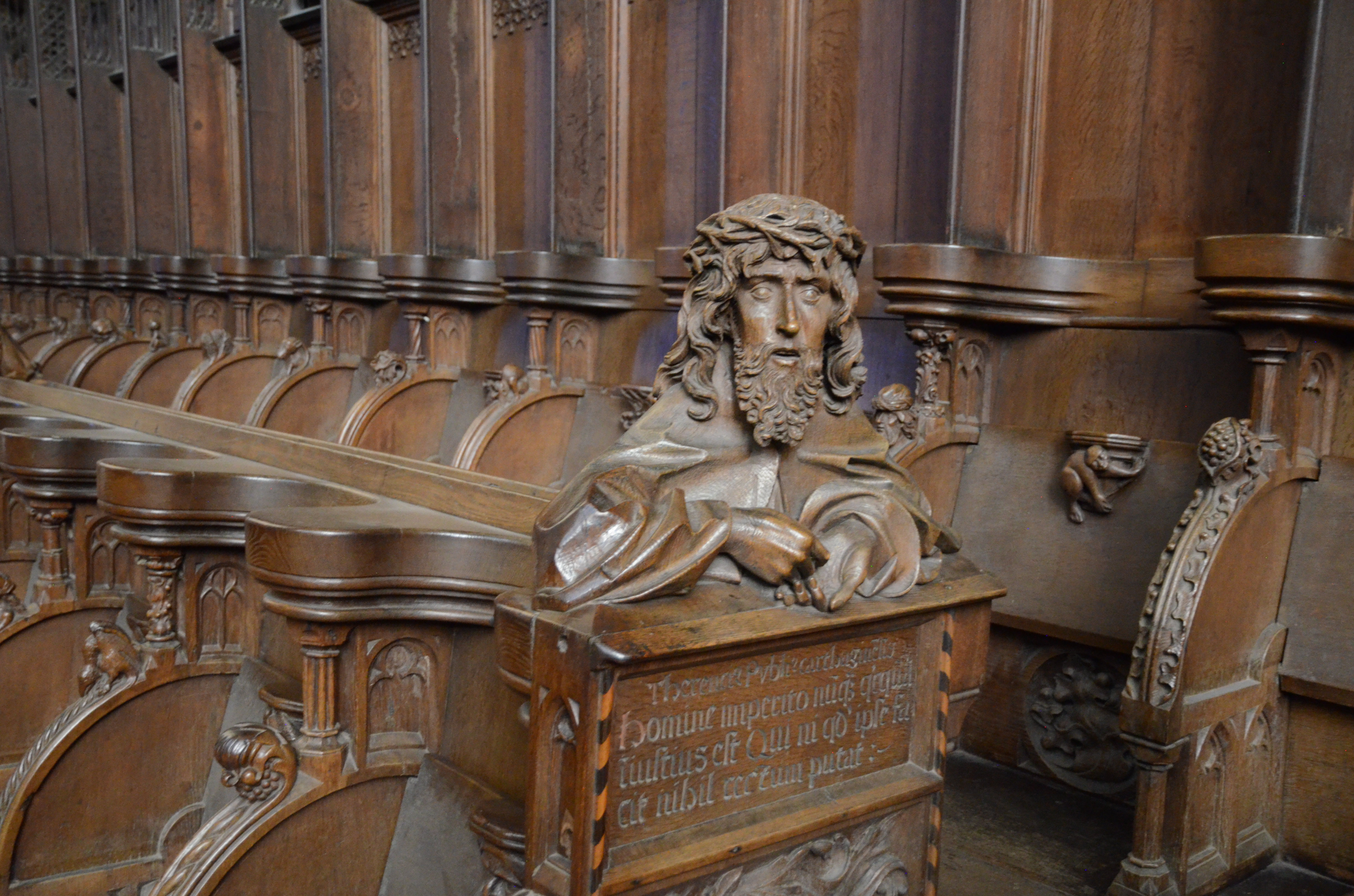 Ulmer Münster: Chorgestühl